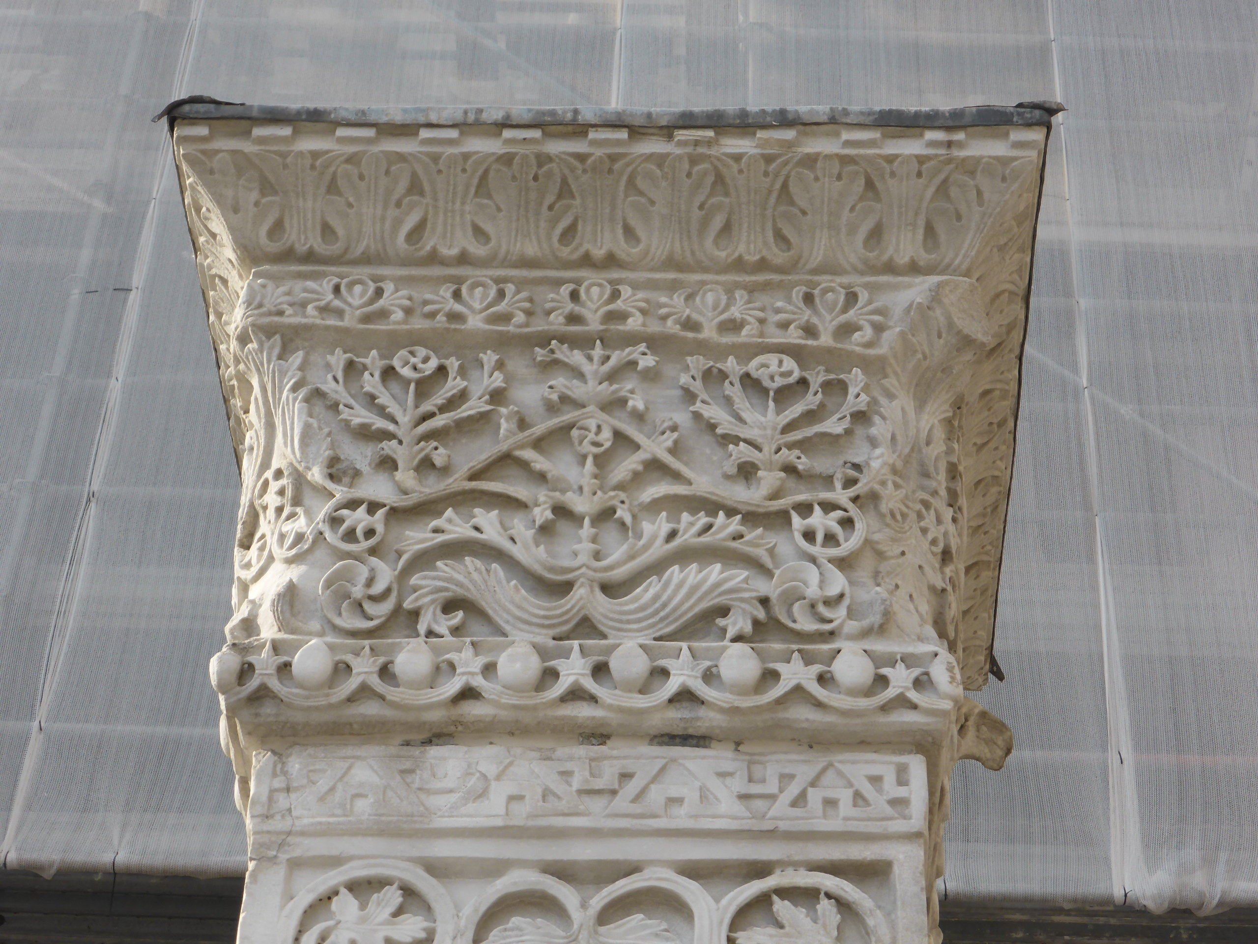 Kapitell, Pilastri Acritiani